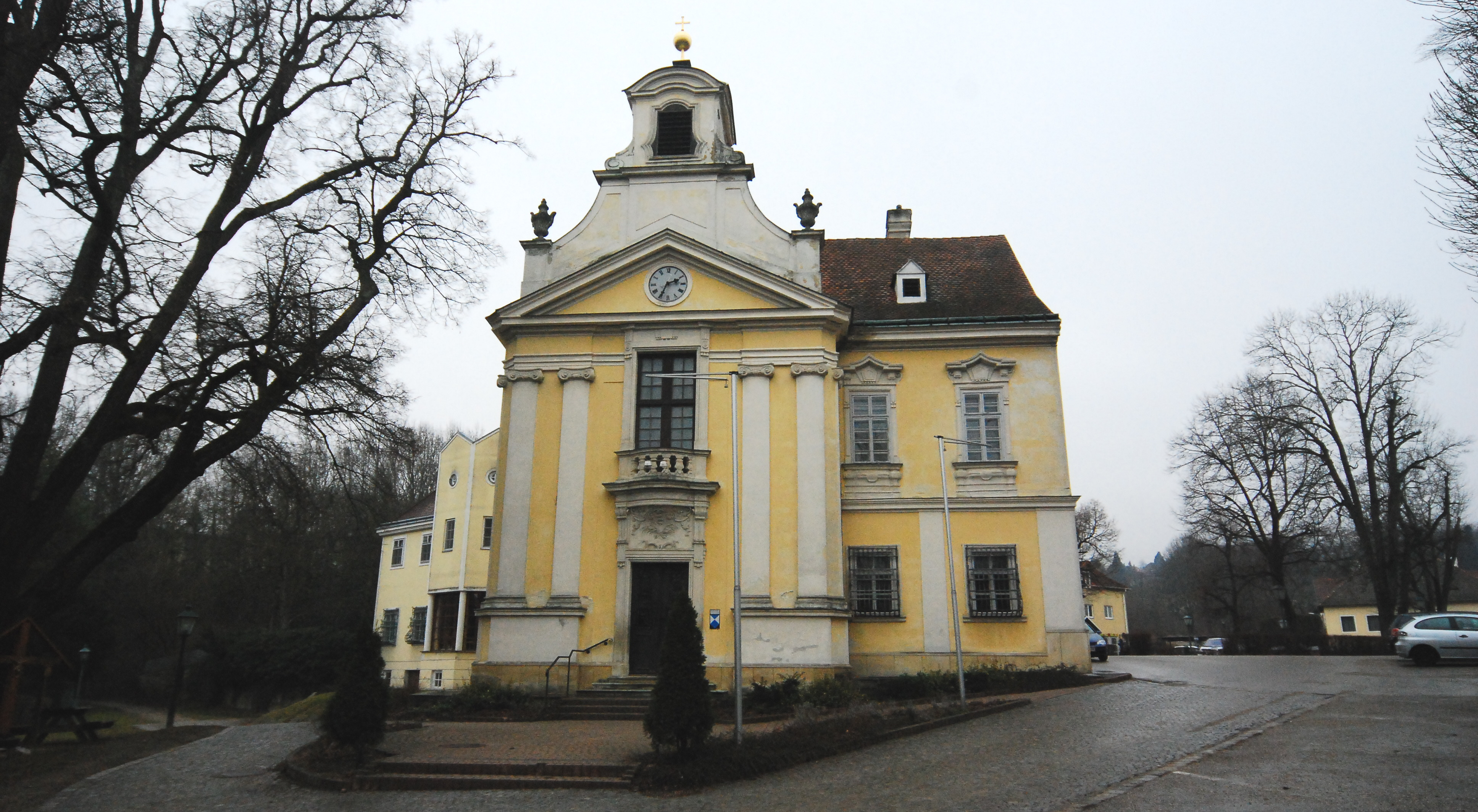 Johannes-Nepomuk-Kirche in Breitenfurt in Niederösterreich